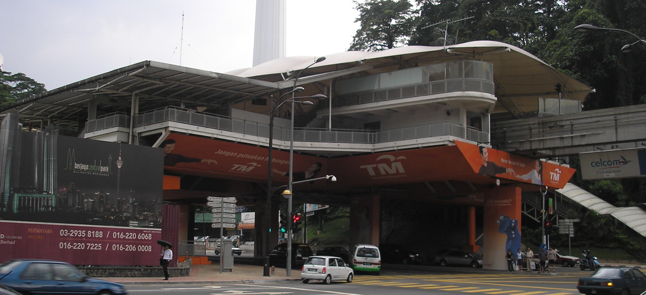 The Bukit Nanas station (Kuala Lumpur Monorail) (exterior), Kuala Lumpur, Malaysia.